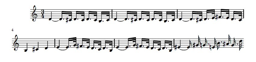 extrait du concerto pour violon de sibelius